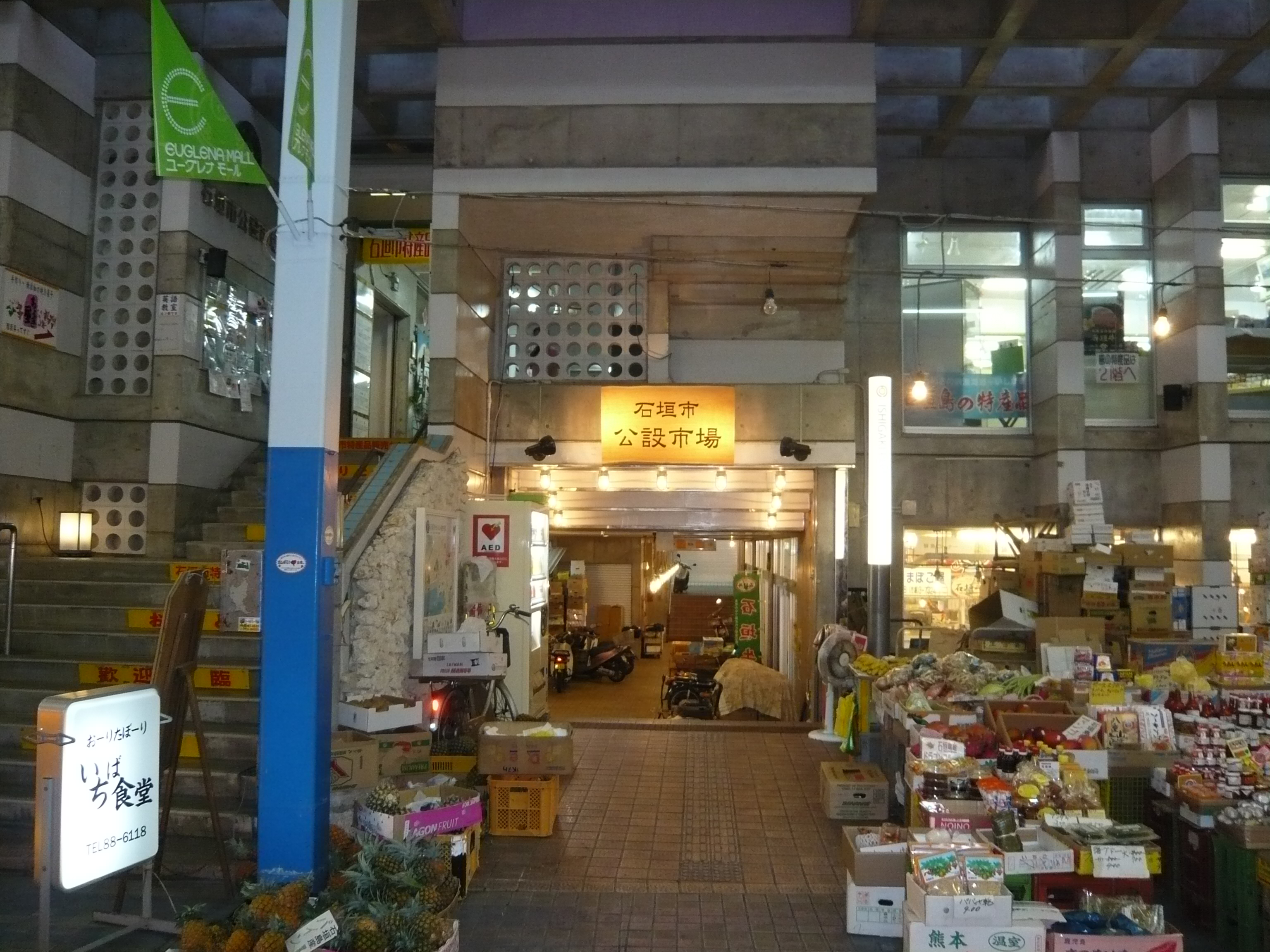 石垣市公設市場。2011年7月12日撮影。